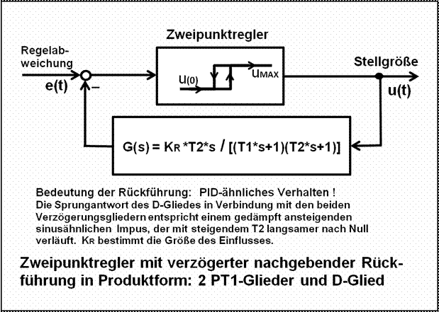 Zweipunktregler mit einer verzögert nachgebenden Rückführung mit 2 PT1-Gliedern und einem D-Glied